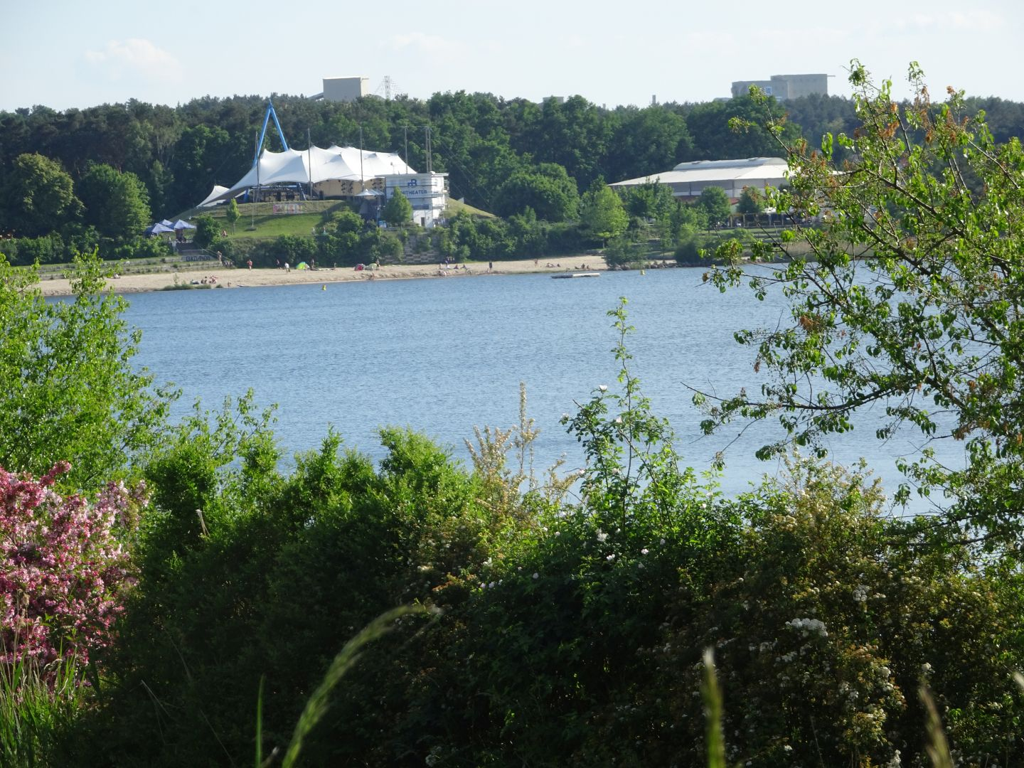 Großkoschen am Senftenberger See